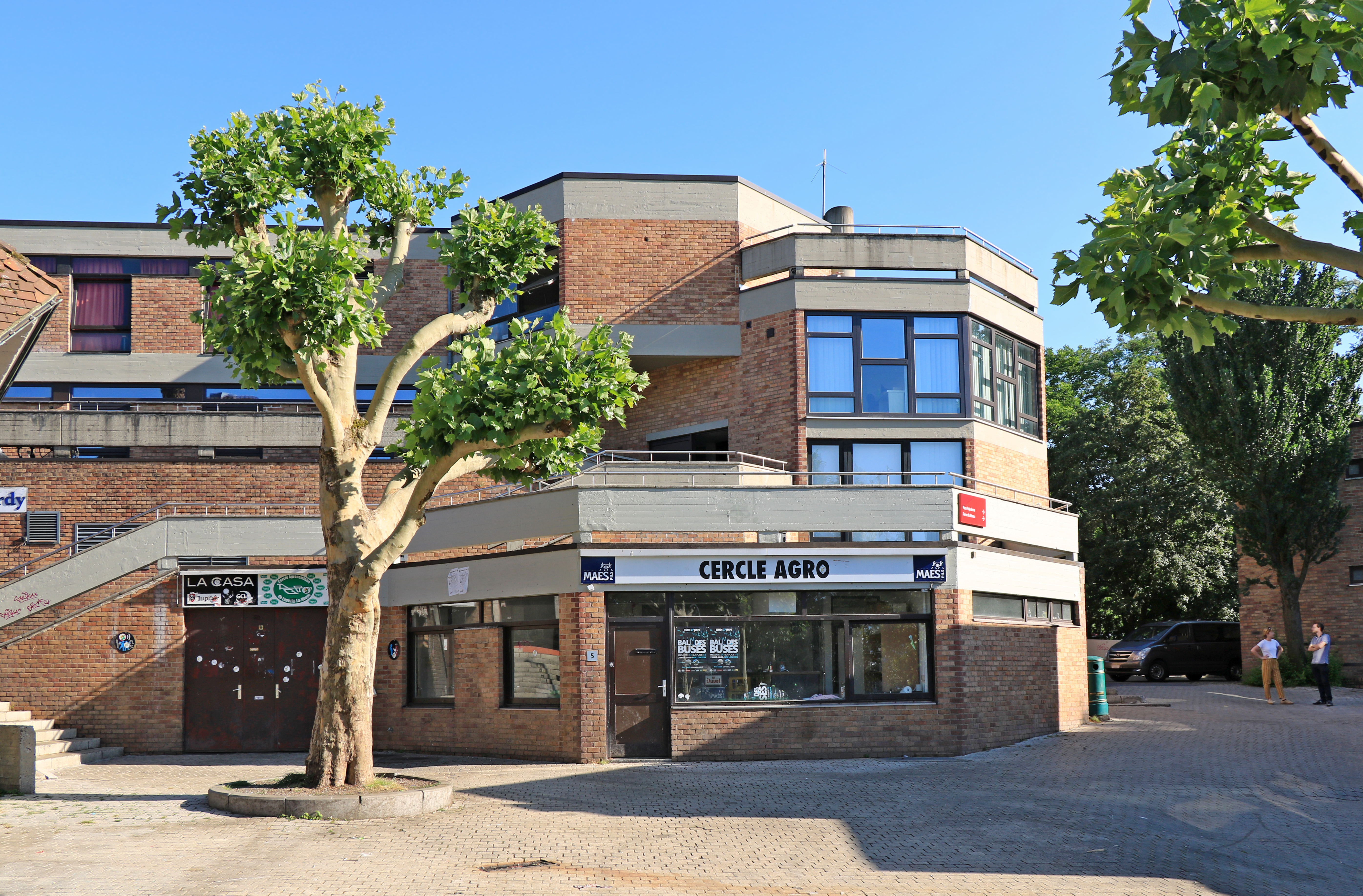 Belgique - Louvain-la-Neuve - Place Galilée - Cercle Agro (Cercle des étudiants de la Faculté des bioingénieurs)